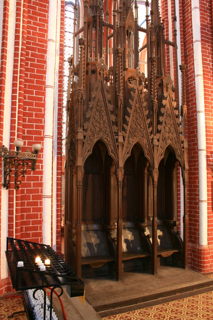 Levitengestühl im Doberaner Münster (um 1300)